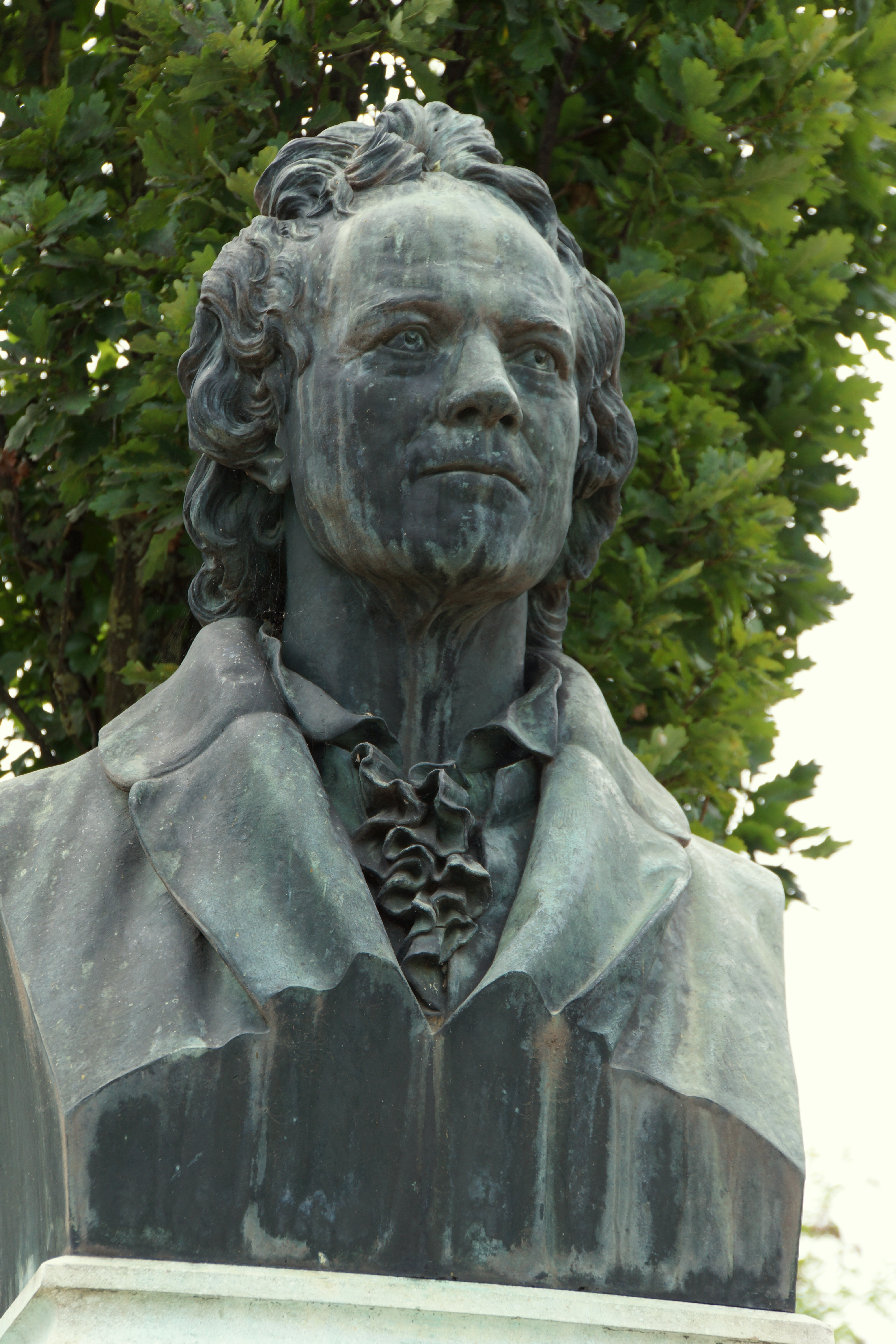 Das Denkmal für den in Weidenwang (oder im Nachbarort Erasbach) geborenen Komponisten Christoph Willibald Gluck stammt von dem Münchner Bildhauer Konrad Knoll aus dem Jahr 1870.